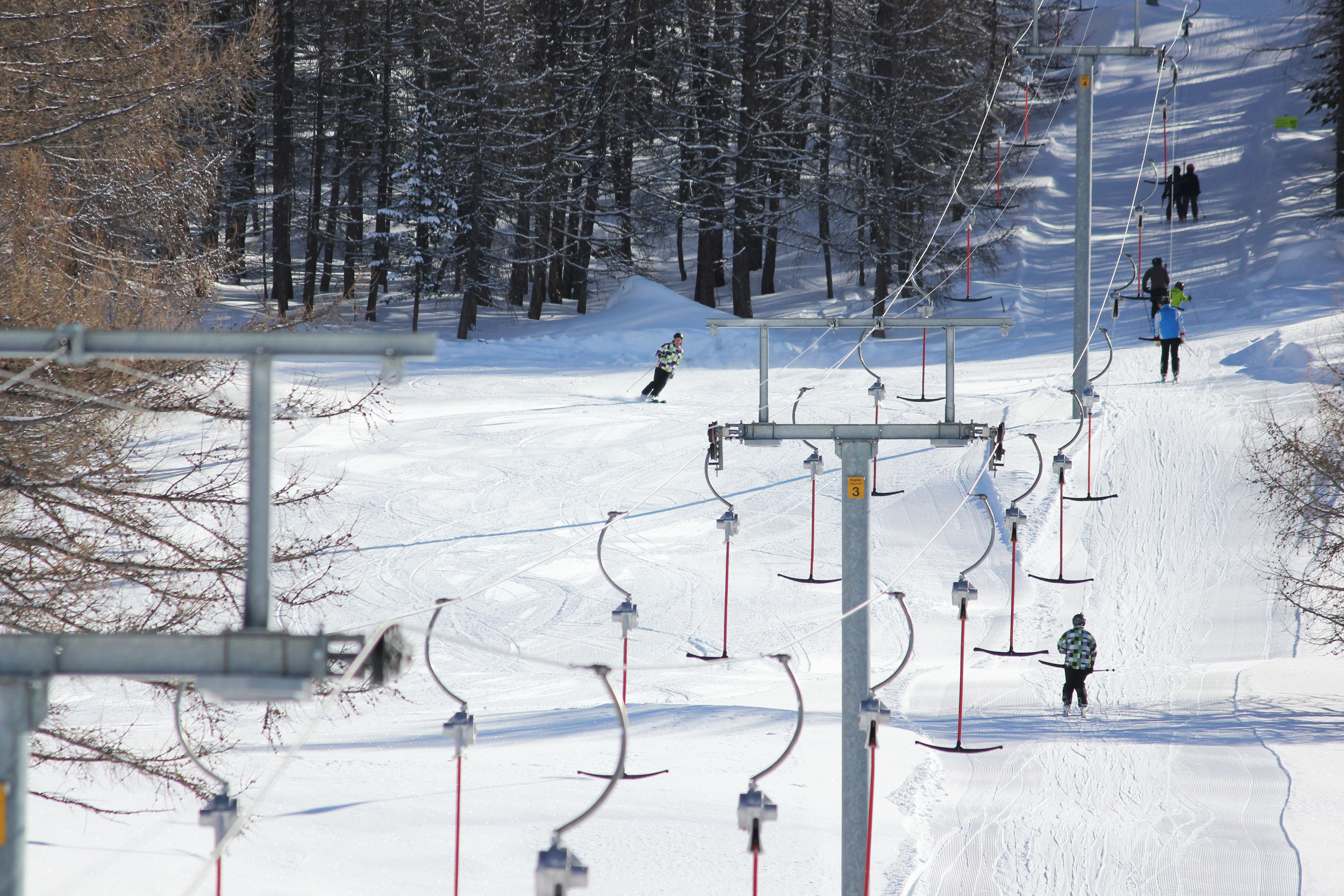 Tourismus in Gspon: Unterer (kleiner) Skilift und Piste